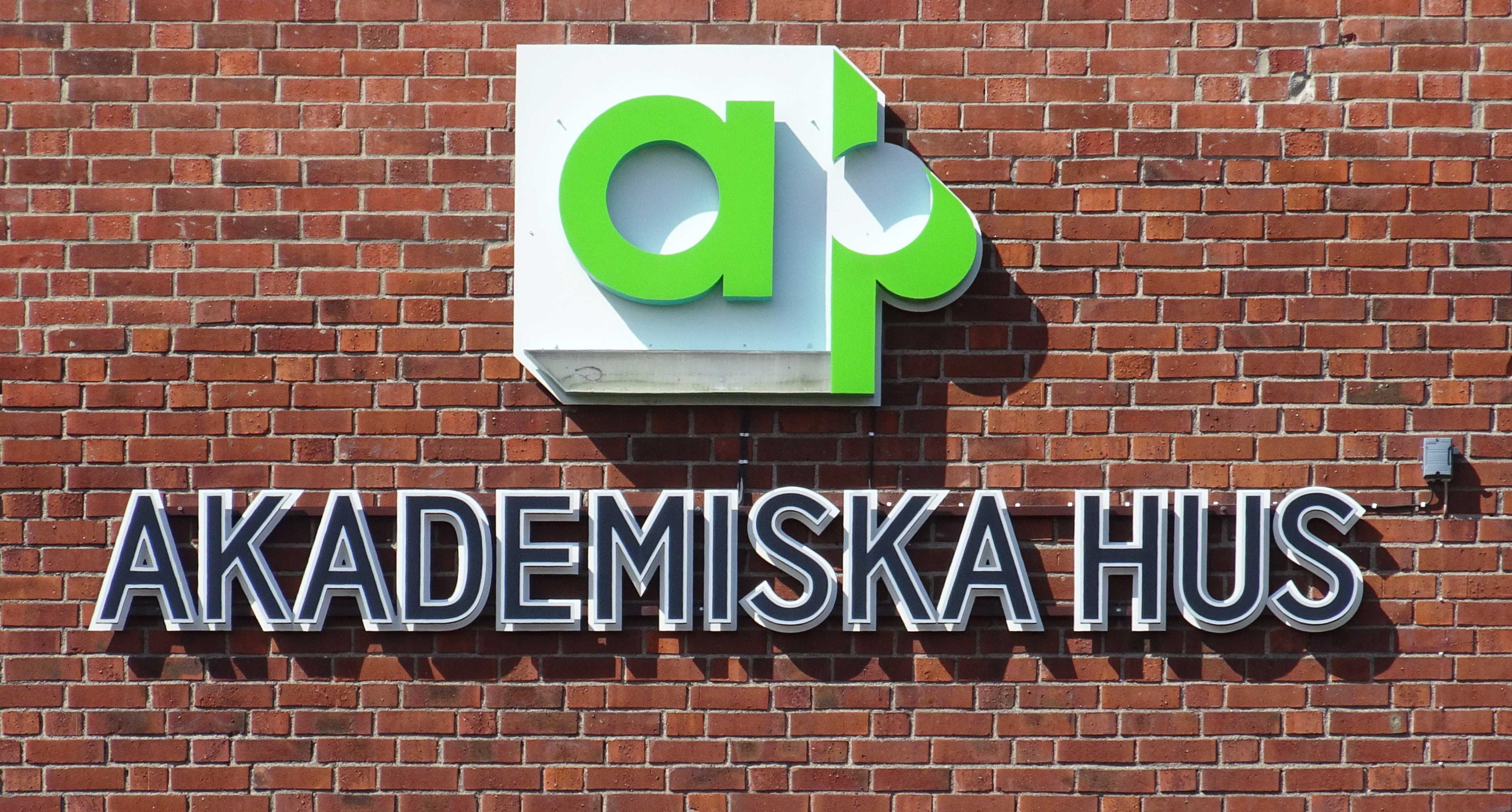 Akademiska hus, Campus Solna